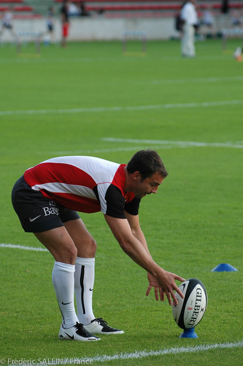 Stade Toulousain – Agen, 25ème journée de Top 14, le 11 mai 2007 A Toulouse (Stade Ernest Wallon)